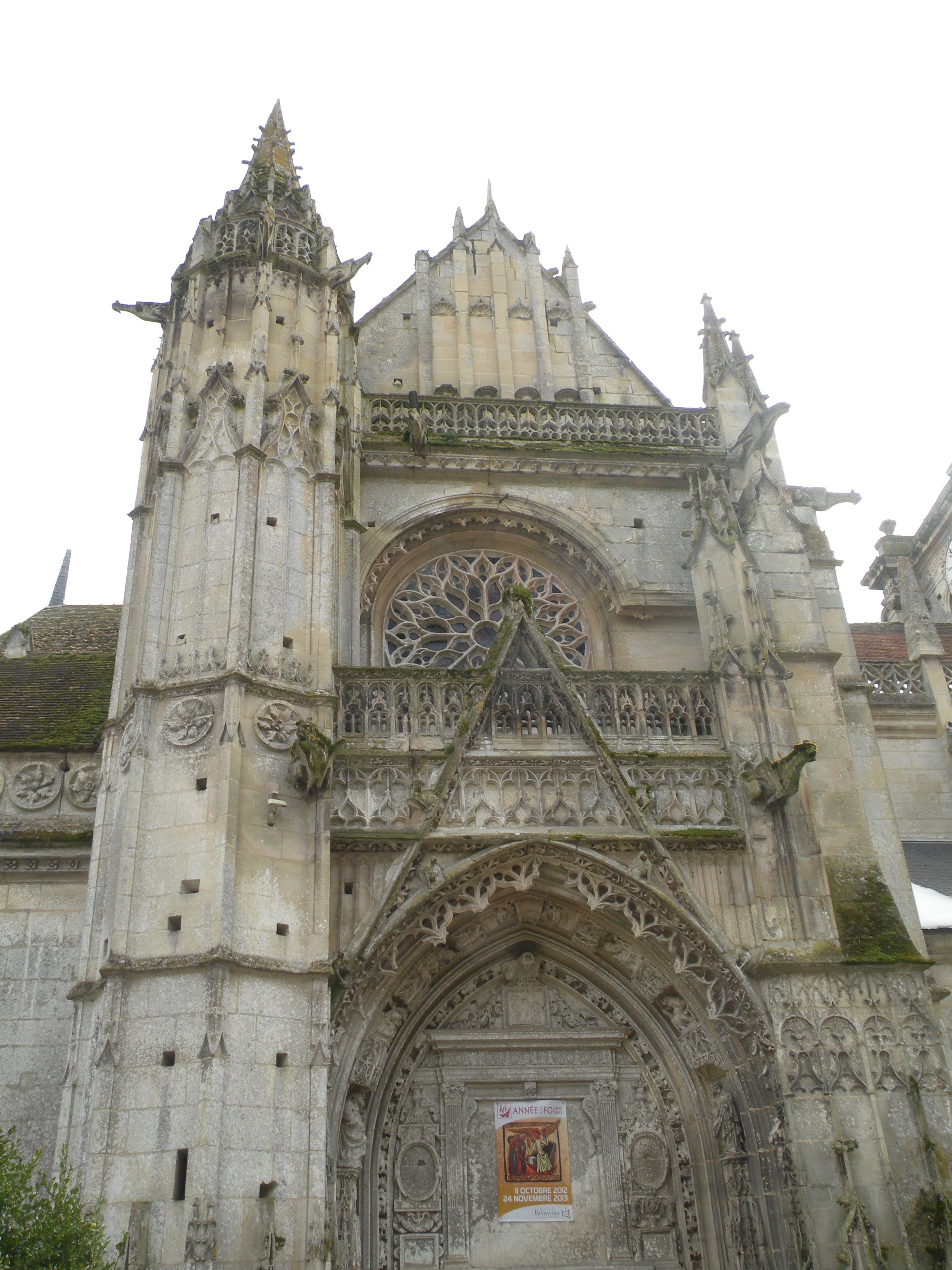 Église de chaumont en vexin portail